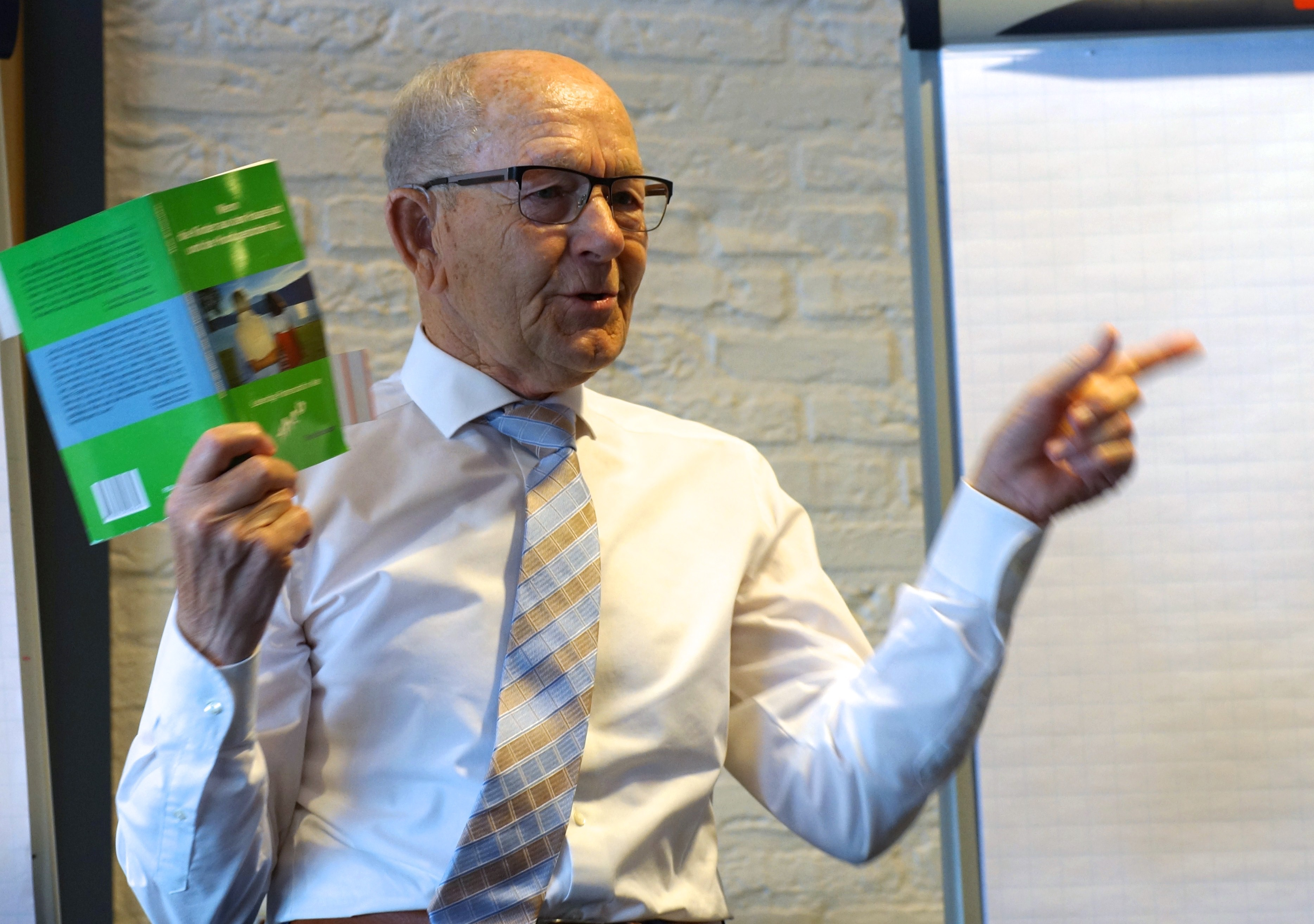 Theo Schoenaker bei einem seiner begeisternden Vorträge